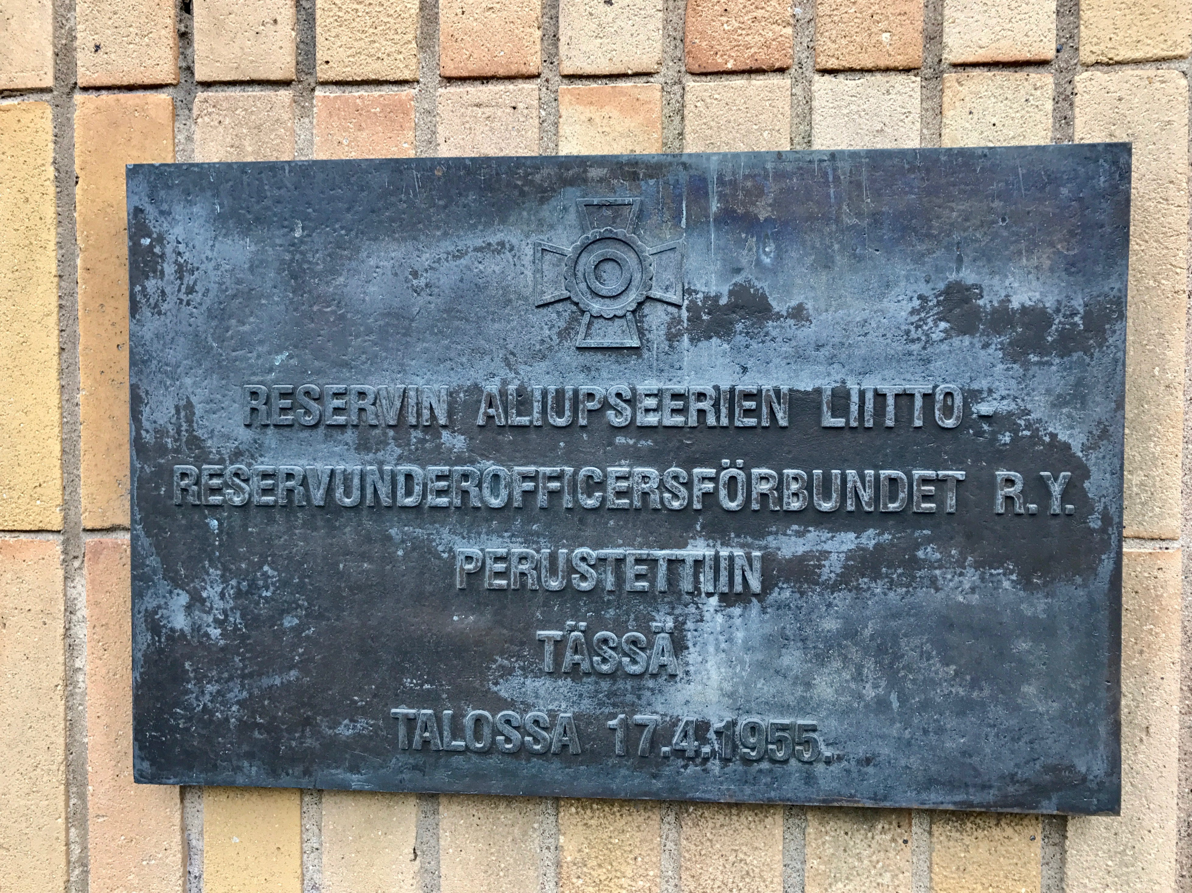 Reservin Aliupseerien Liiton perustamisen muistolaatta Helsingin suojeluskuntatalon seinässä.